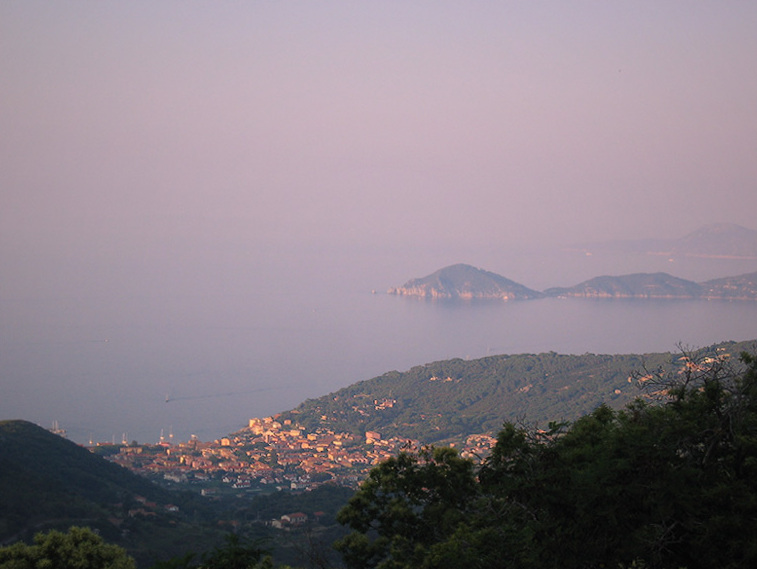 Marciana Marina, Isola d'Elba - 2005